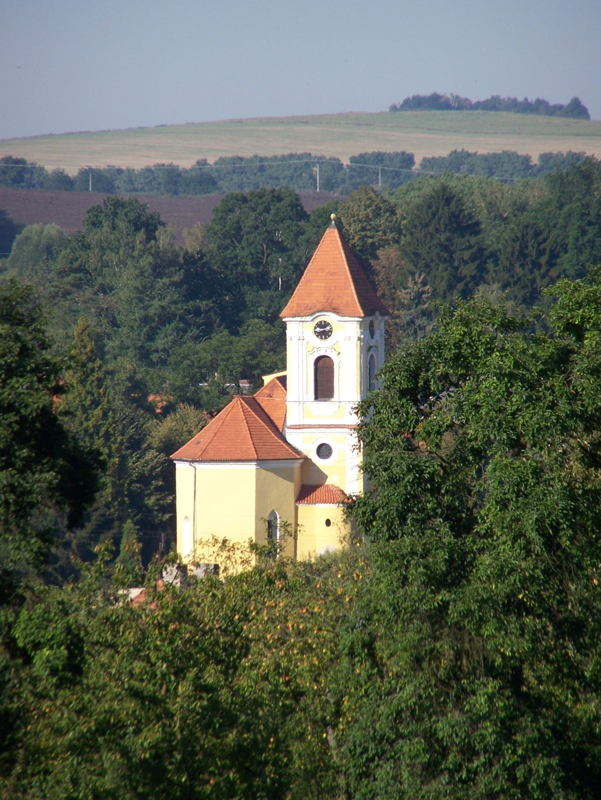 Kostel v Bystřici u Benešova od Opřetic